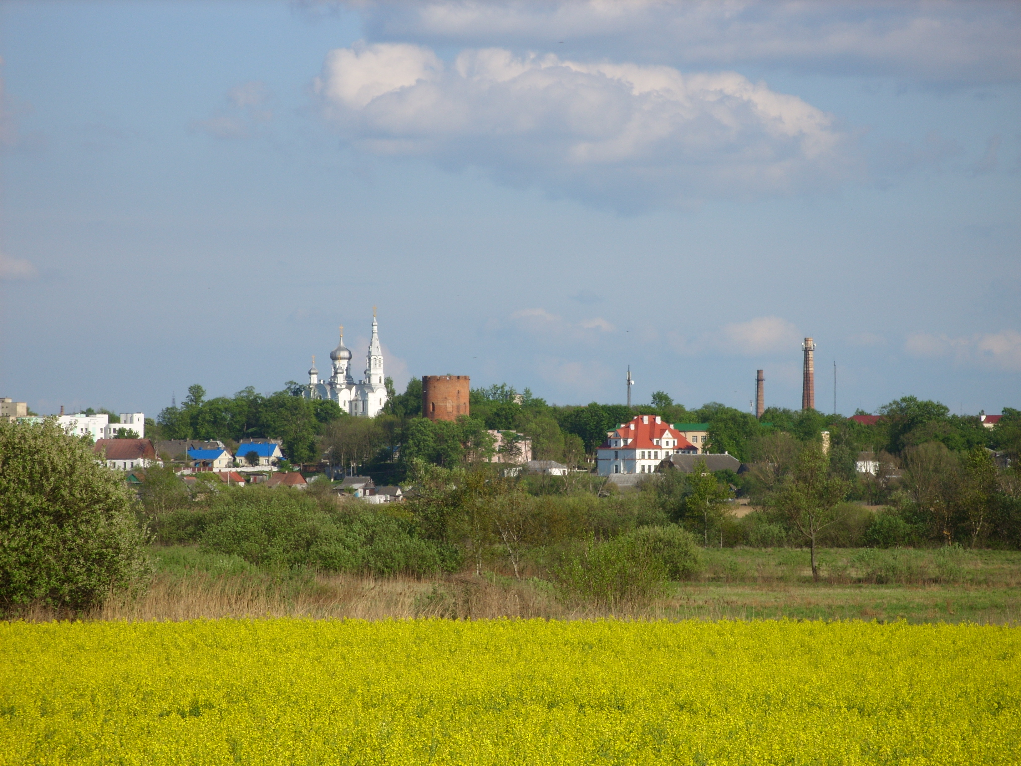 Вид на старый город